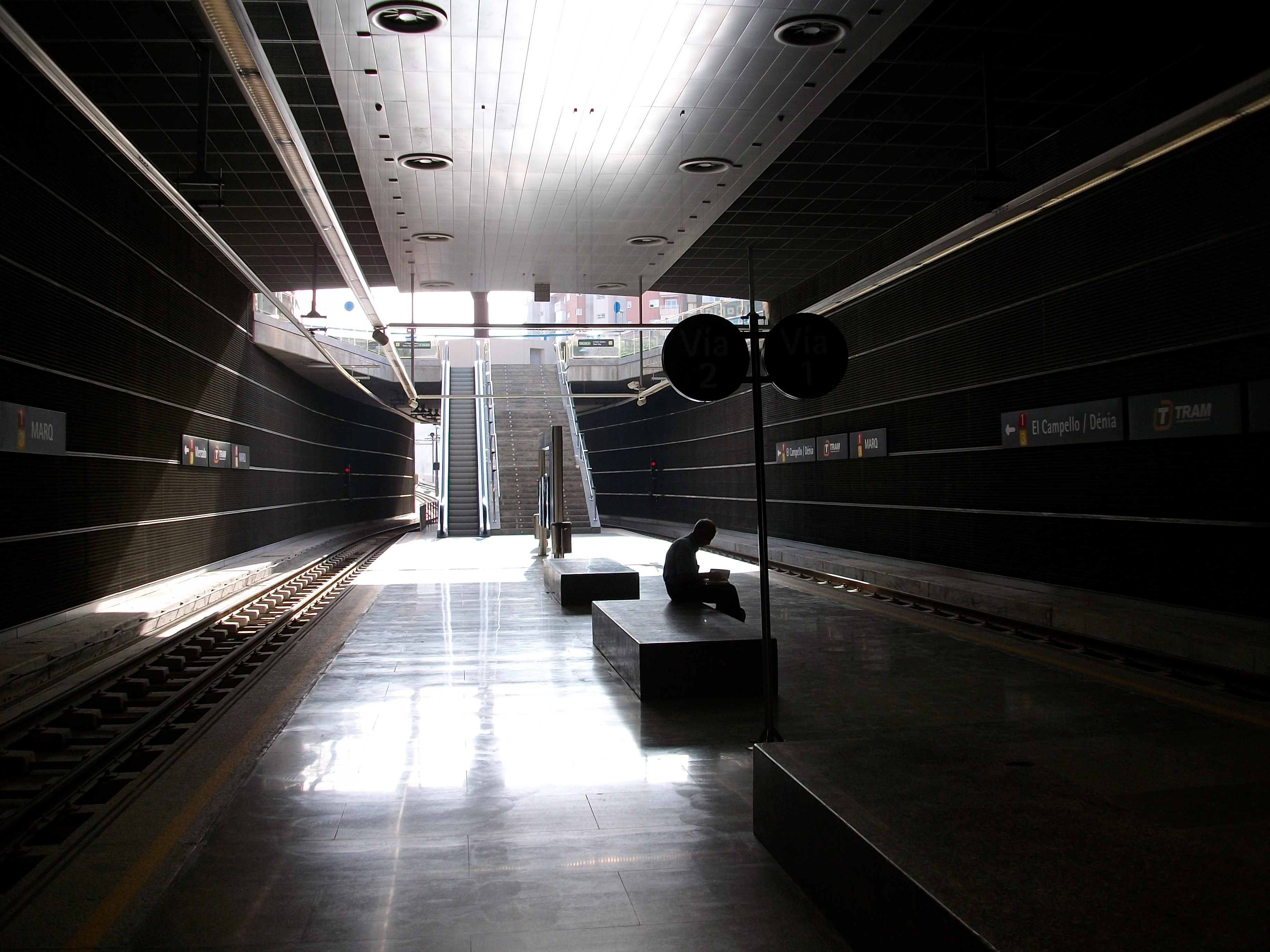 Estació del MARQ del TRAM d'Alacant.